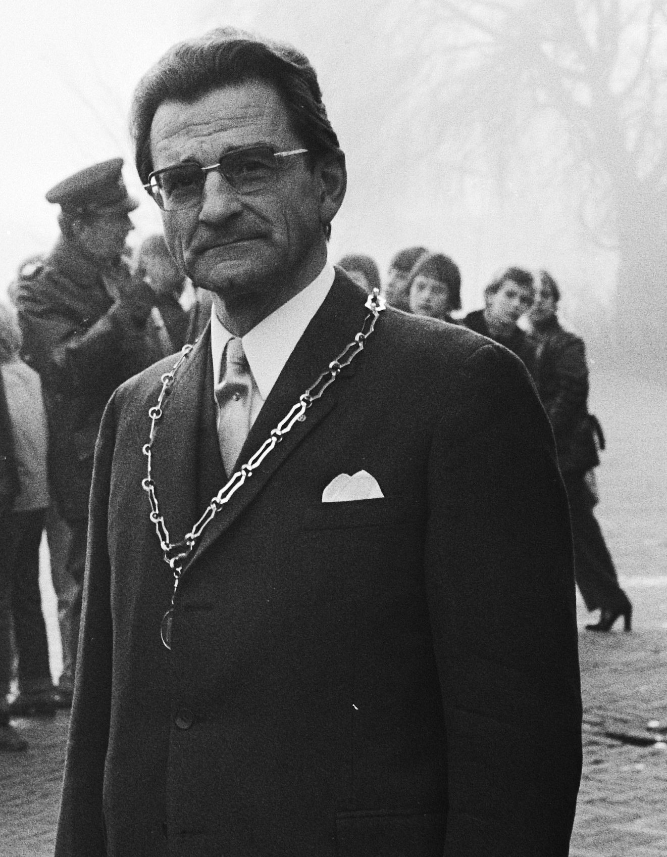 Diemen 750 jaar , "Bisschop Otto II" met burgemeester Strumphler Tiedeman